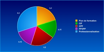 camenbert répartition